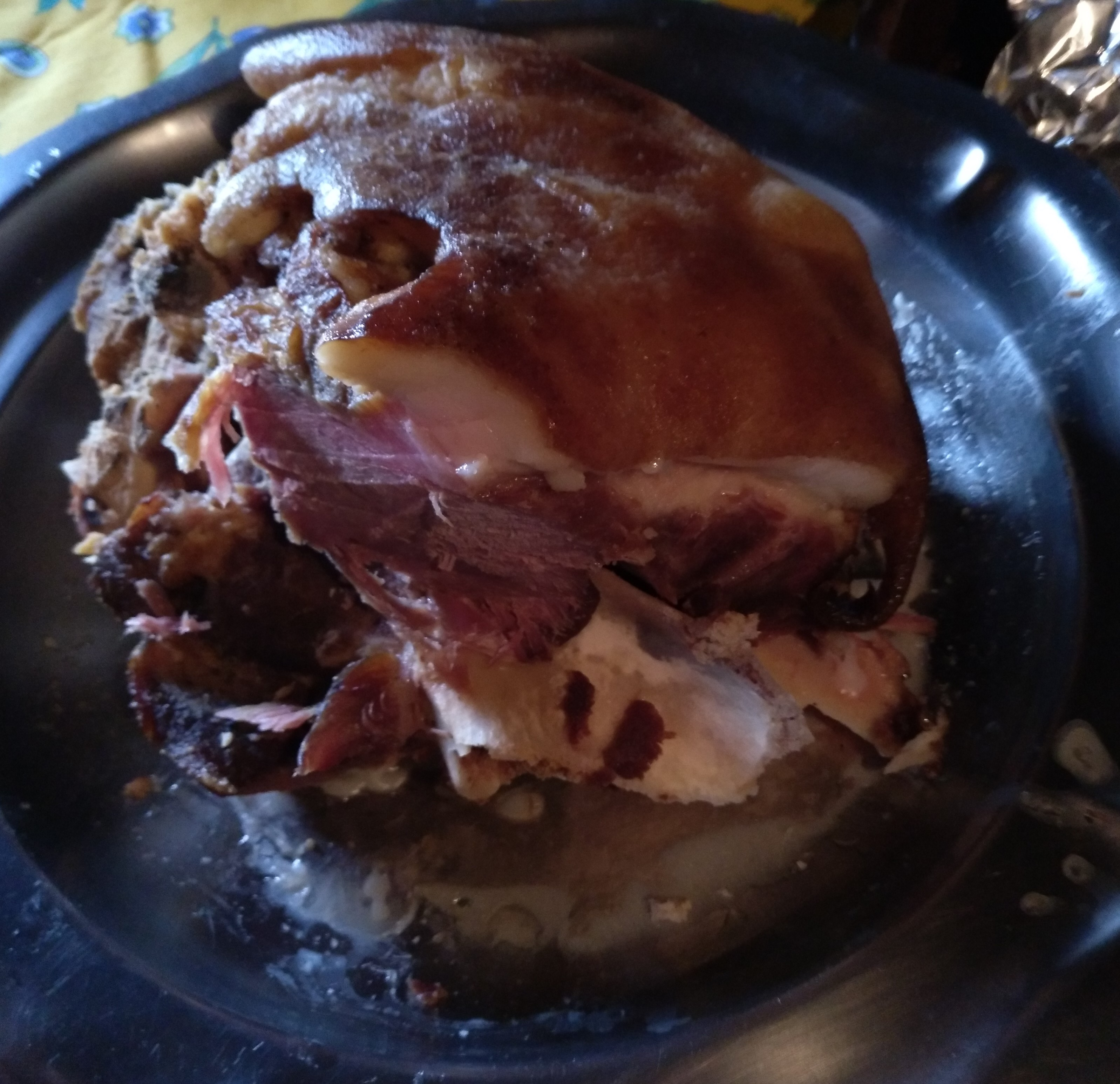 Lacoeira, parte do porco arredor do lacón, que se salga e se come cocida